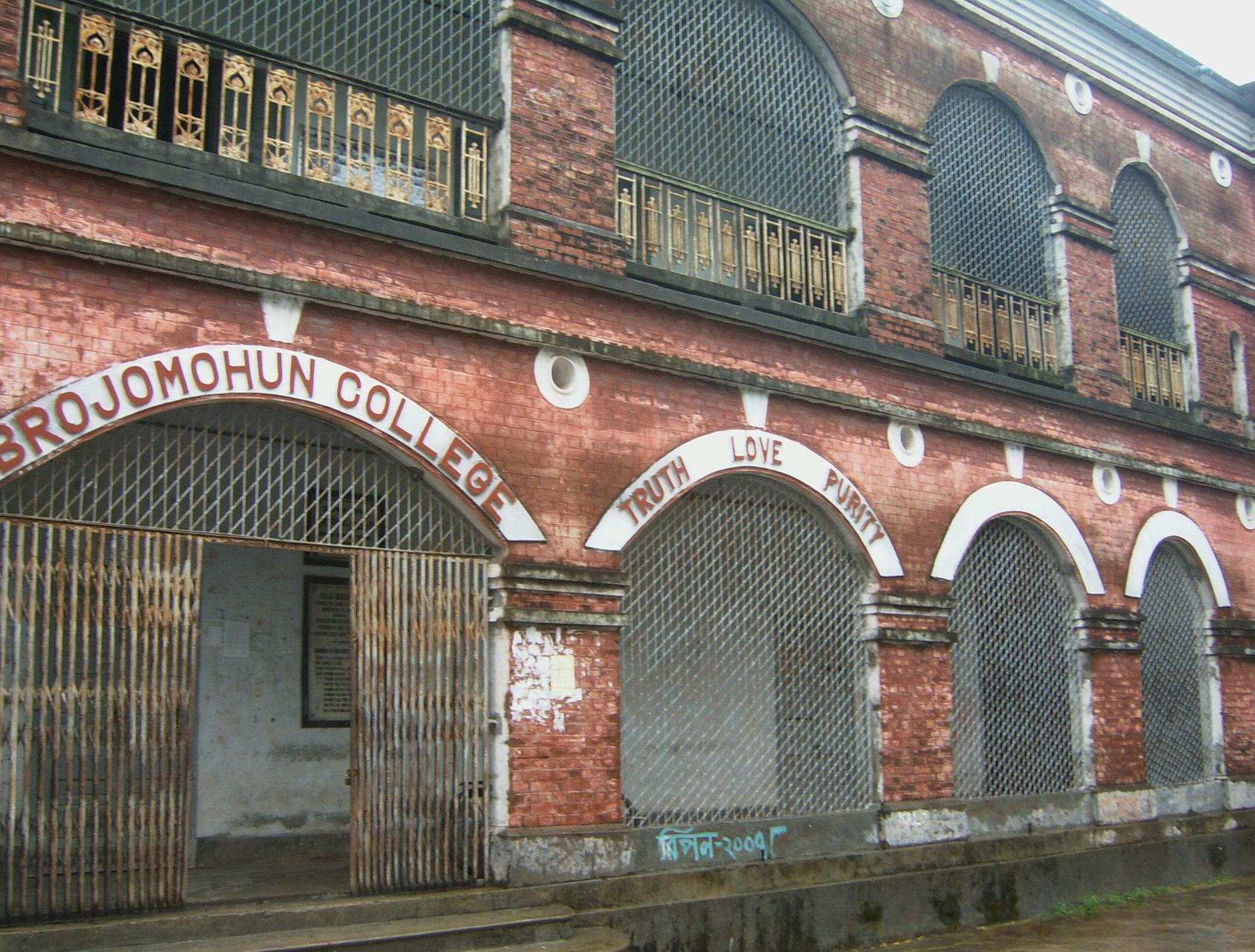 Brajamohan College, Barisal, Bangladesh.